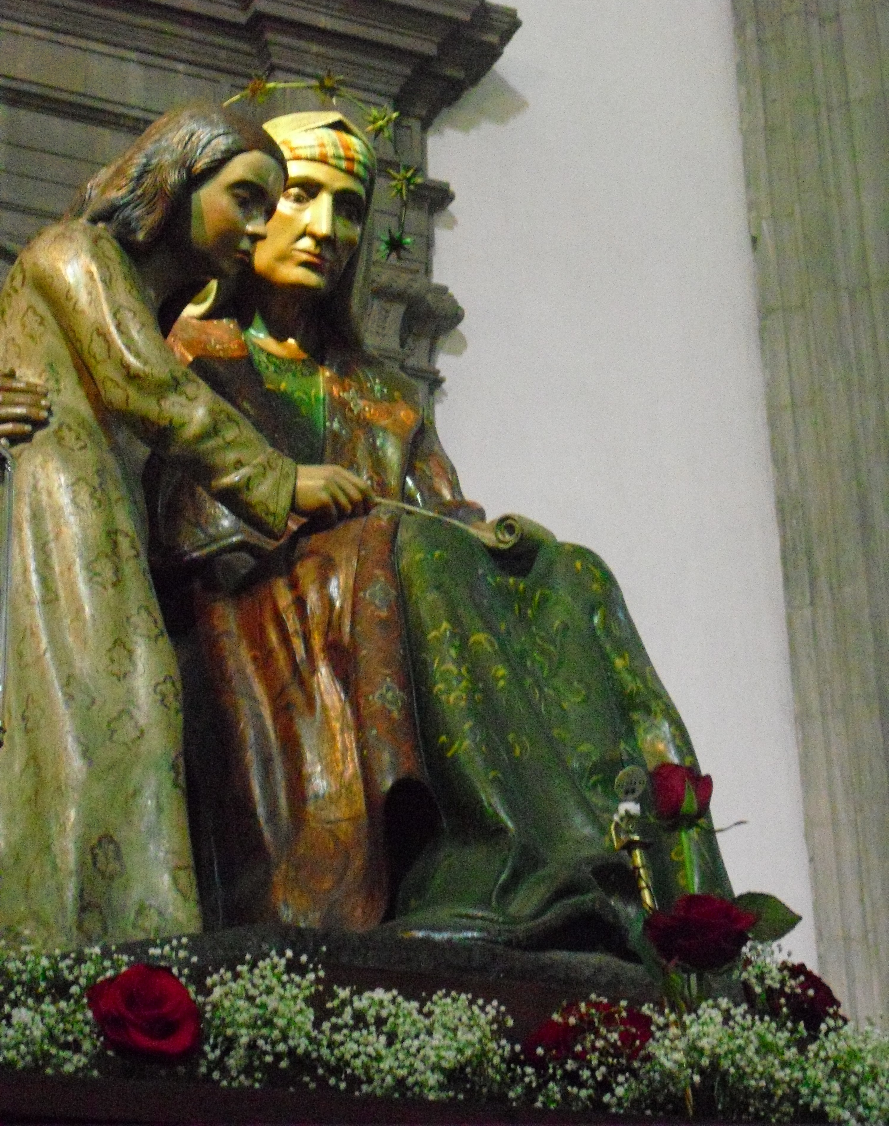 Imagen de Santa Ana con la Virgen Niña. Catedral de Canarias.